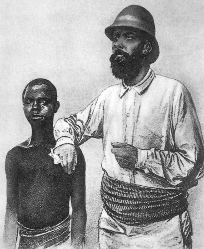 Richard Kund, deutscher Offizier und Afrikaforscher.